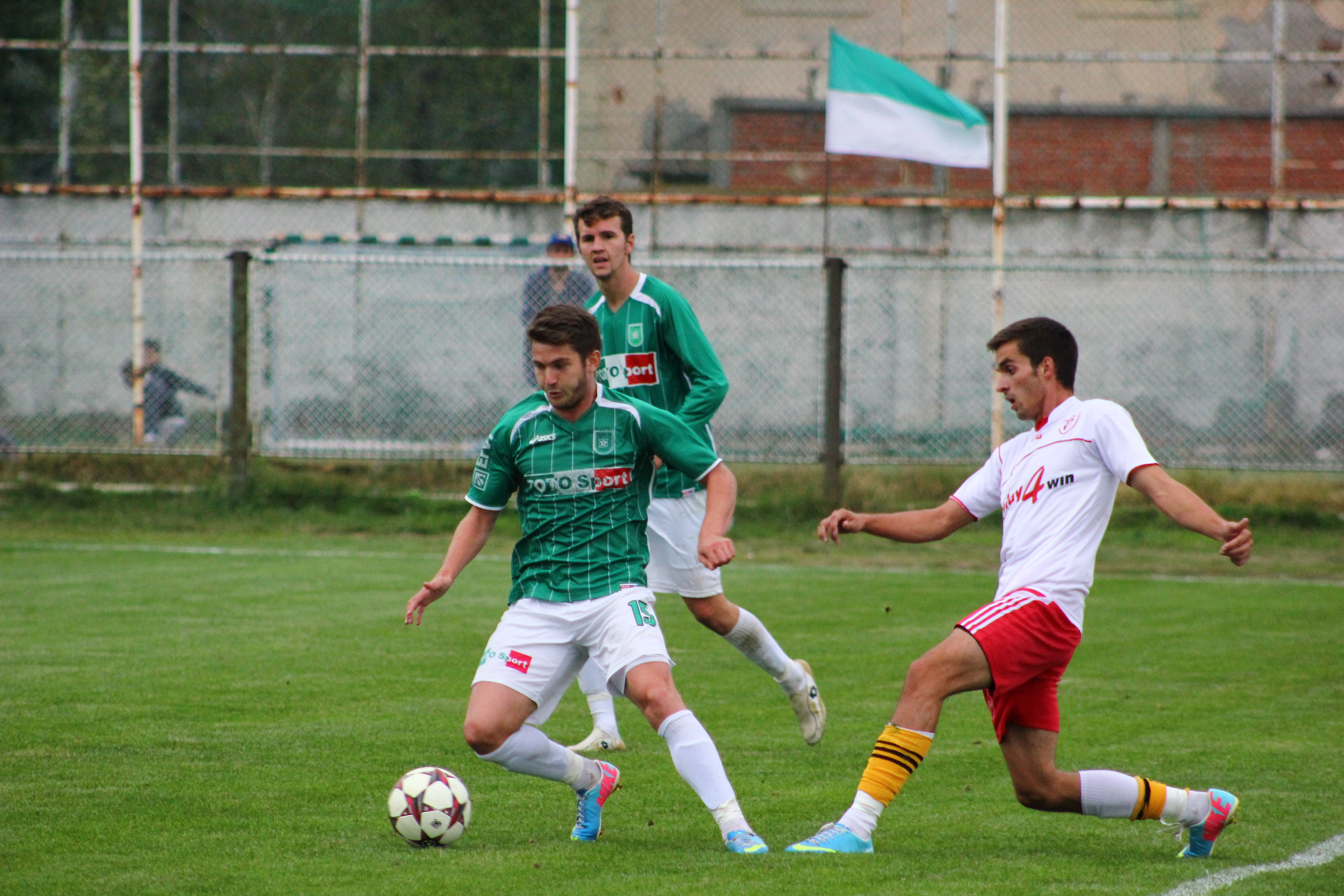 Fotografi gjatë një ndeshje futbolli në Mitrovicë